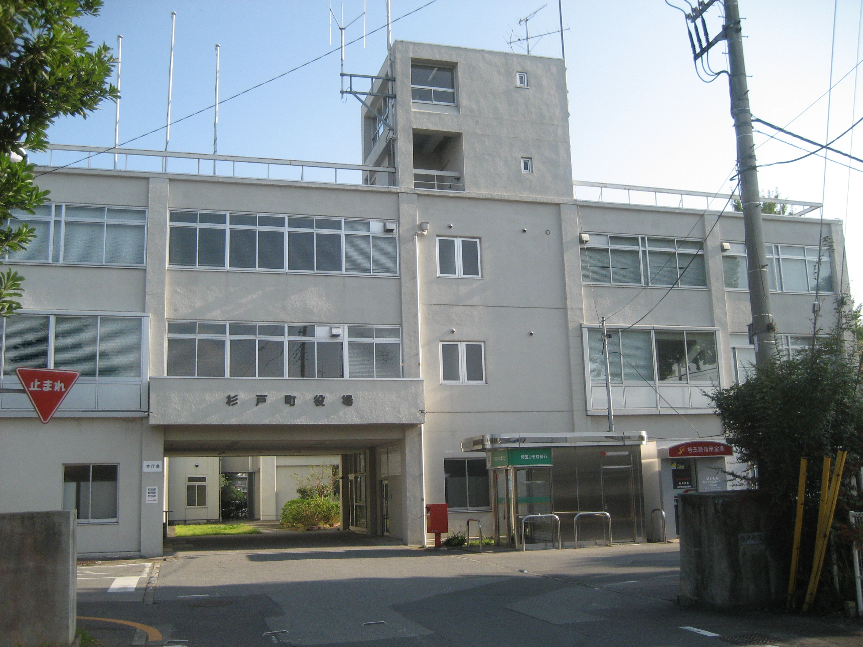 杉戸町役場